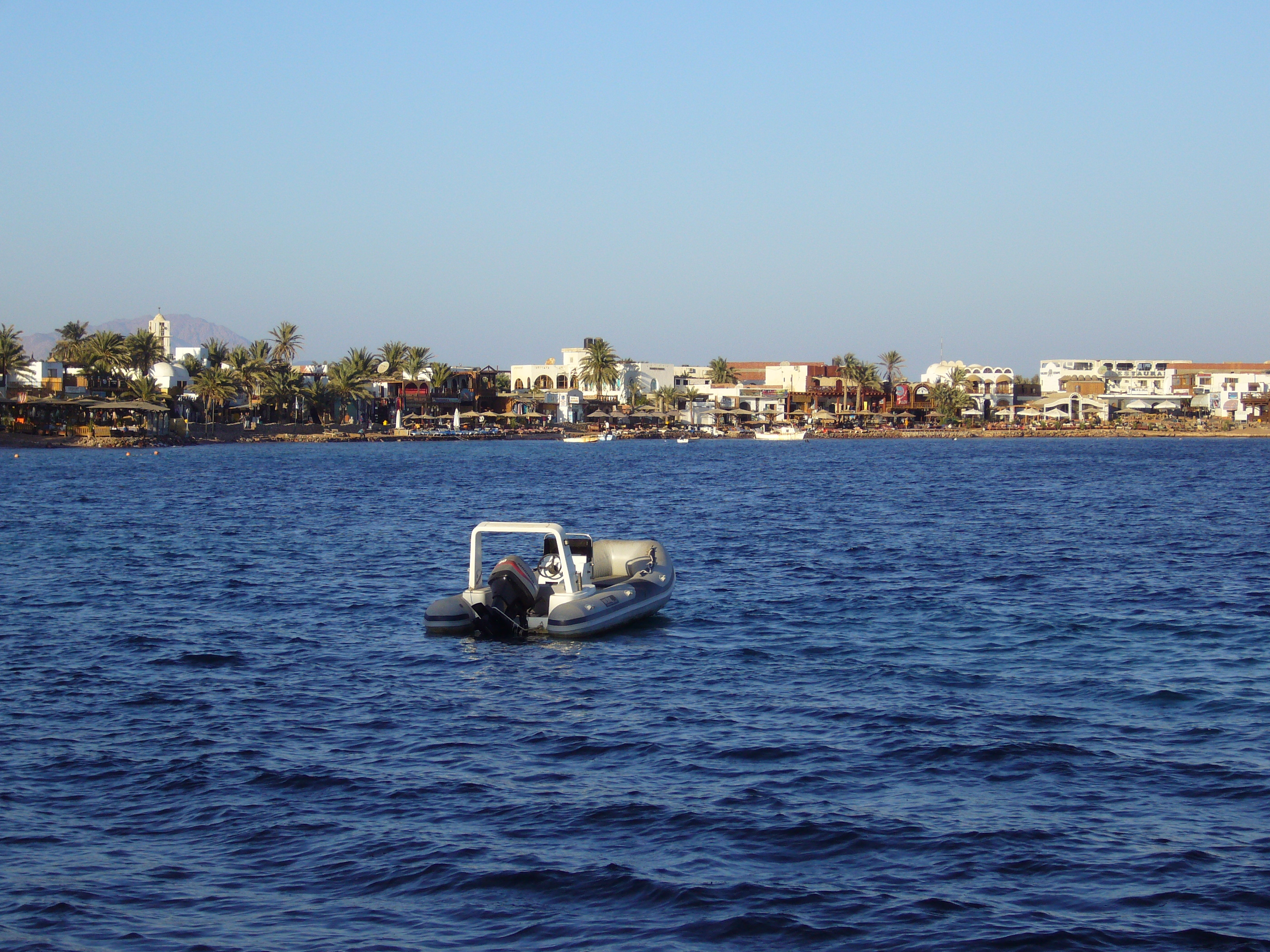 Sinai - Taba